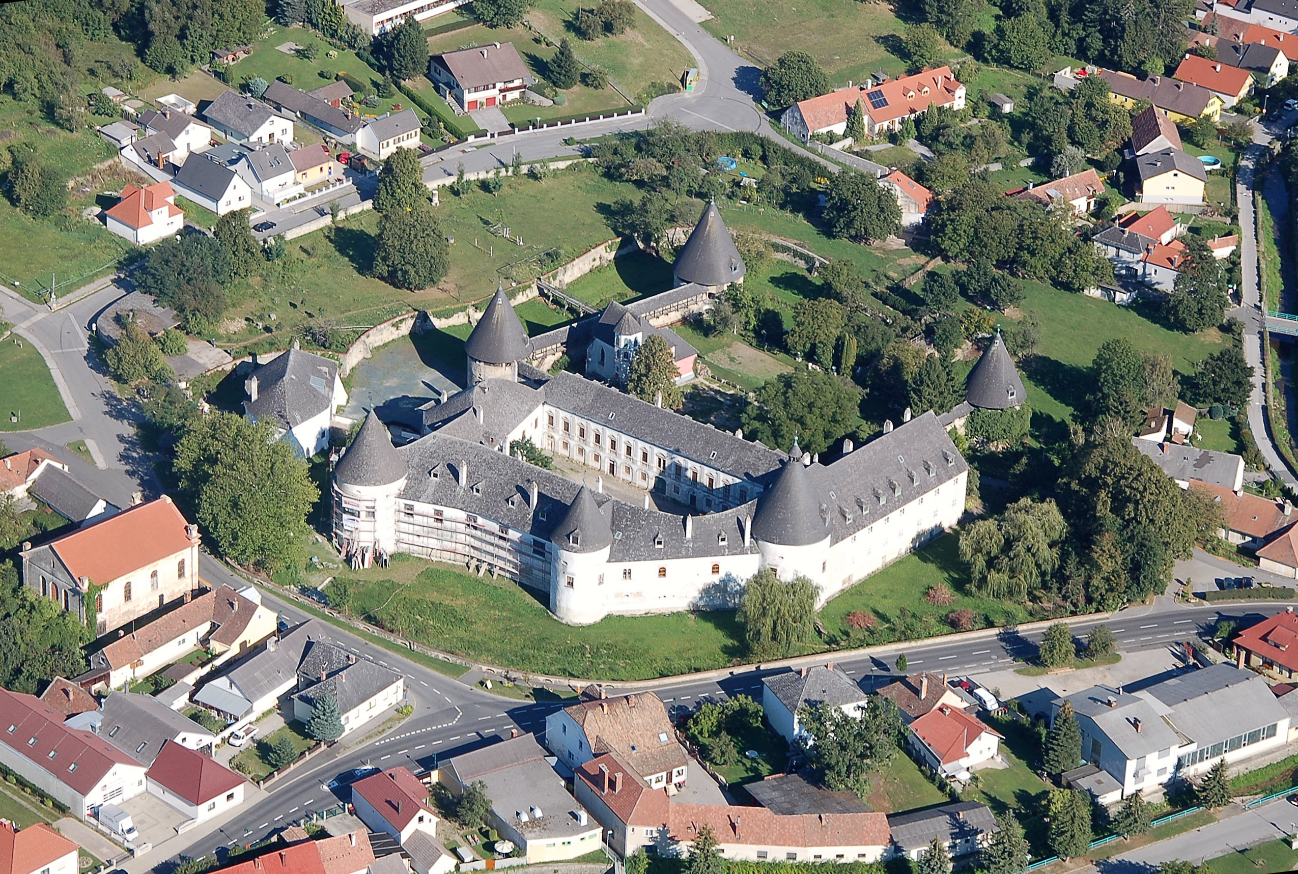 Schloss